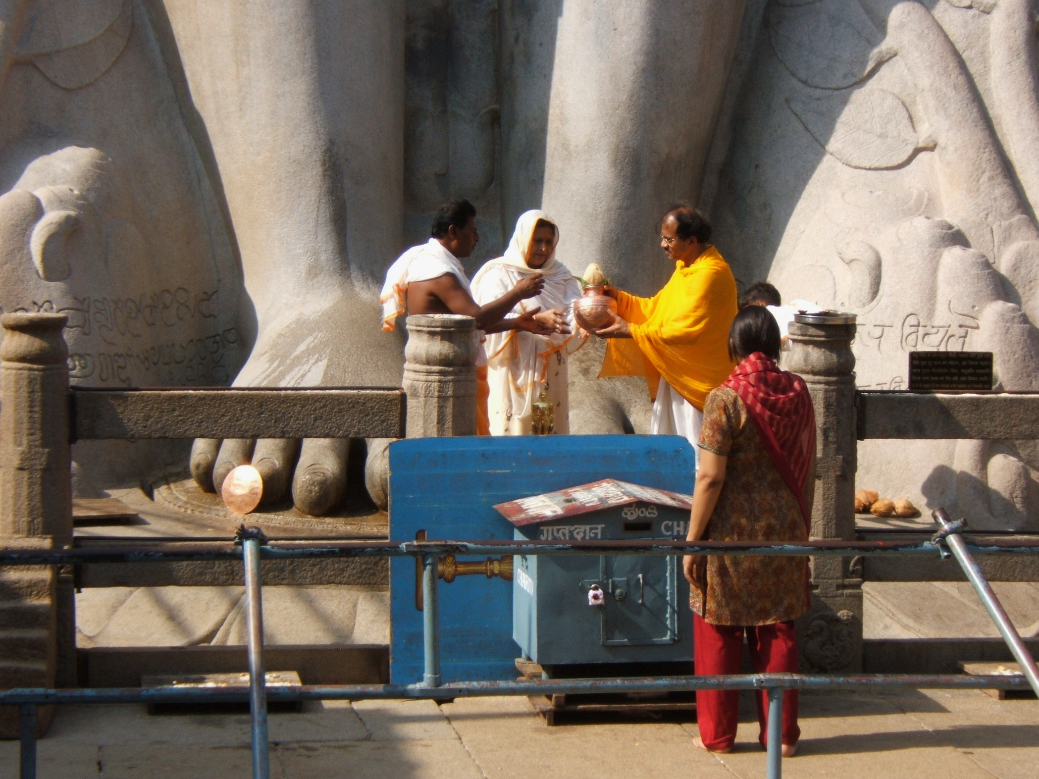 Shravanabelagola, Karnataka, India